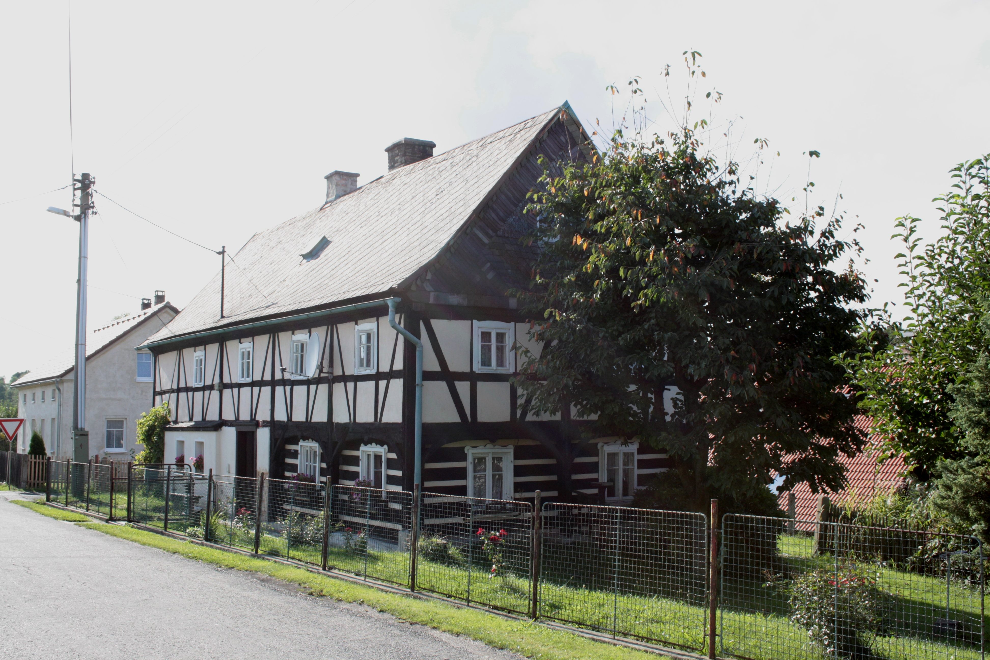 This photograph was taken with a DSLR from WMCZ's Camera grant. Dům číslo popisné 70 v Habarticích v okrese Liberec (pohled z východu).